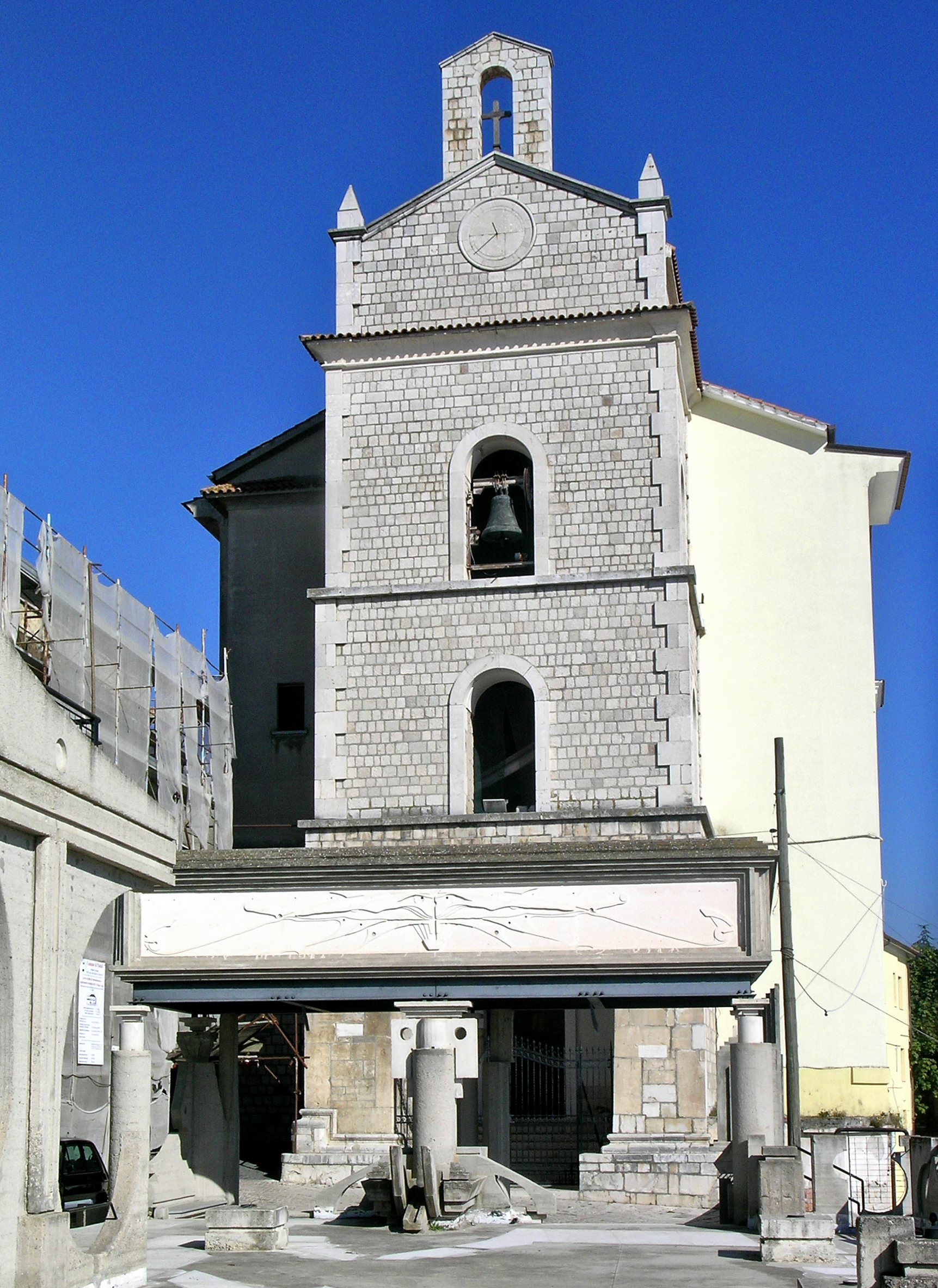 Il campanile-facciata della Chiesa di San Bartolomeo di Paduli (BN)